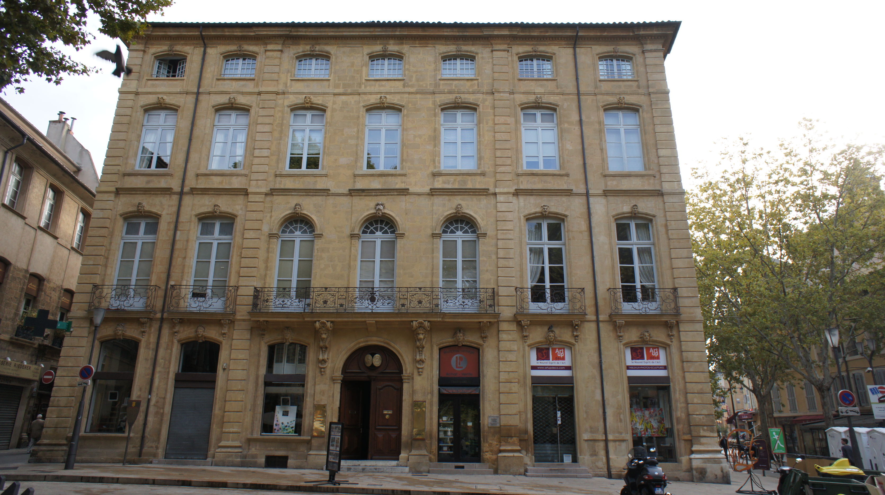 Hôtel Gautier du Poët, 1 place Forbin, Aix-en-Provence (France). A son emplacement existait un moulin à eau, hors les murs jusqu'en 1656, qui fournissait en farine les boulangers d'Aix. L'hôtel fut construit en 1730 pour Henri Gautier, roturier, clerc de notaire avisé, enrichi par sa charge de Trésorier des États de Provence. Il fut anobli en 1724 par l'achat des terres de Vernègues et de celles du Poët près de Sisteron. L'imposant édifice, entièrement décoré, s'élance en hauteur par ses chainages à refends dans les angles. Il ferme le Cours Mirabeau par sa façade Régence, entièrement ornée de mascarons dans les clefs de fenêtres proposant des visages tous différents. Sa porte encadrée de pilastres doriques, est surmontée d'un balcon à l'élégante ferronnerie Louis XV, que soutiennent deux consoles à têtes de lions.